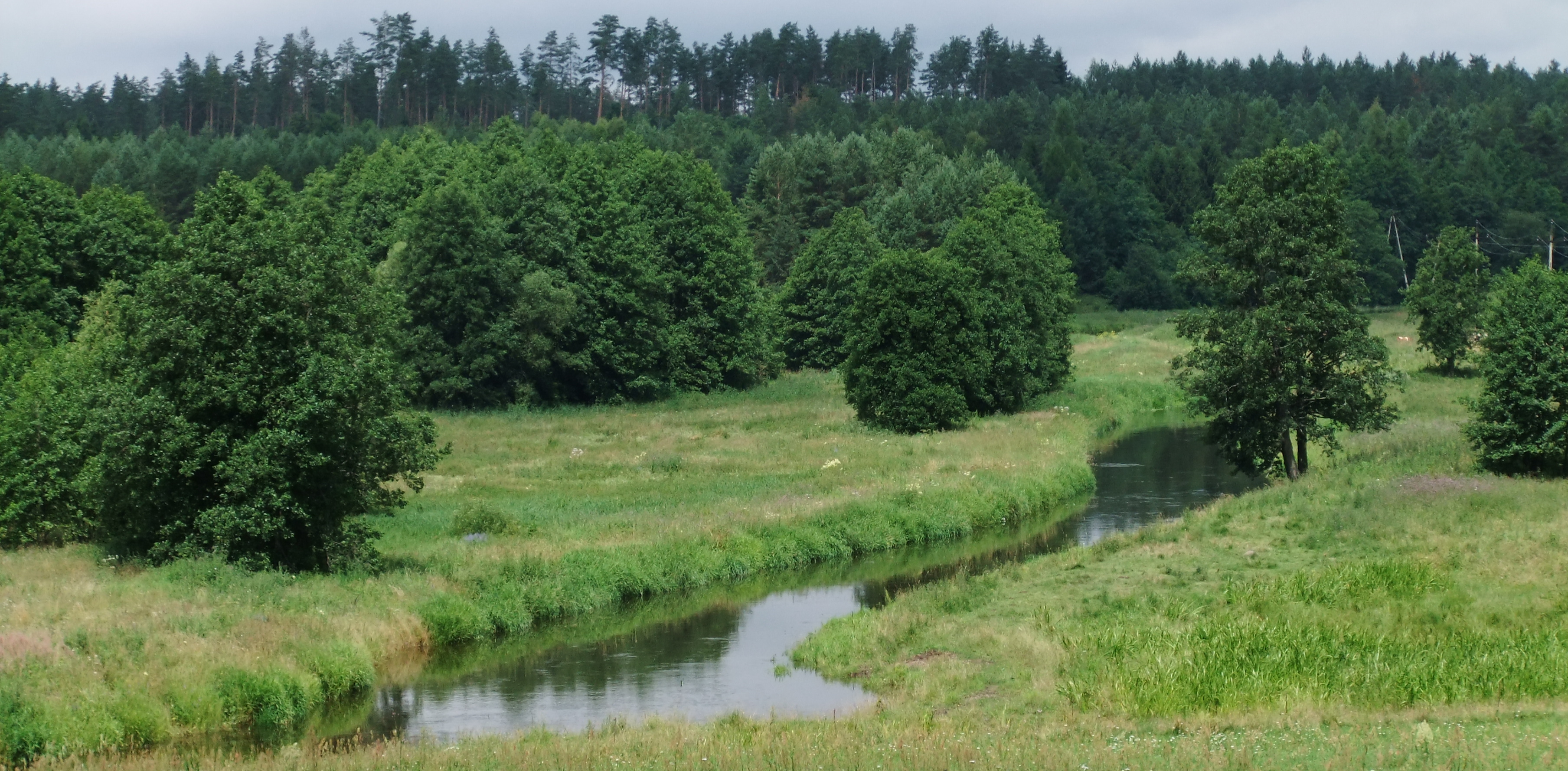 Fluss Goldap, westlich von Gołdap bei Strugi